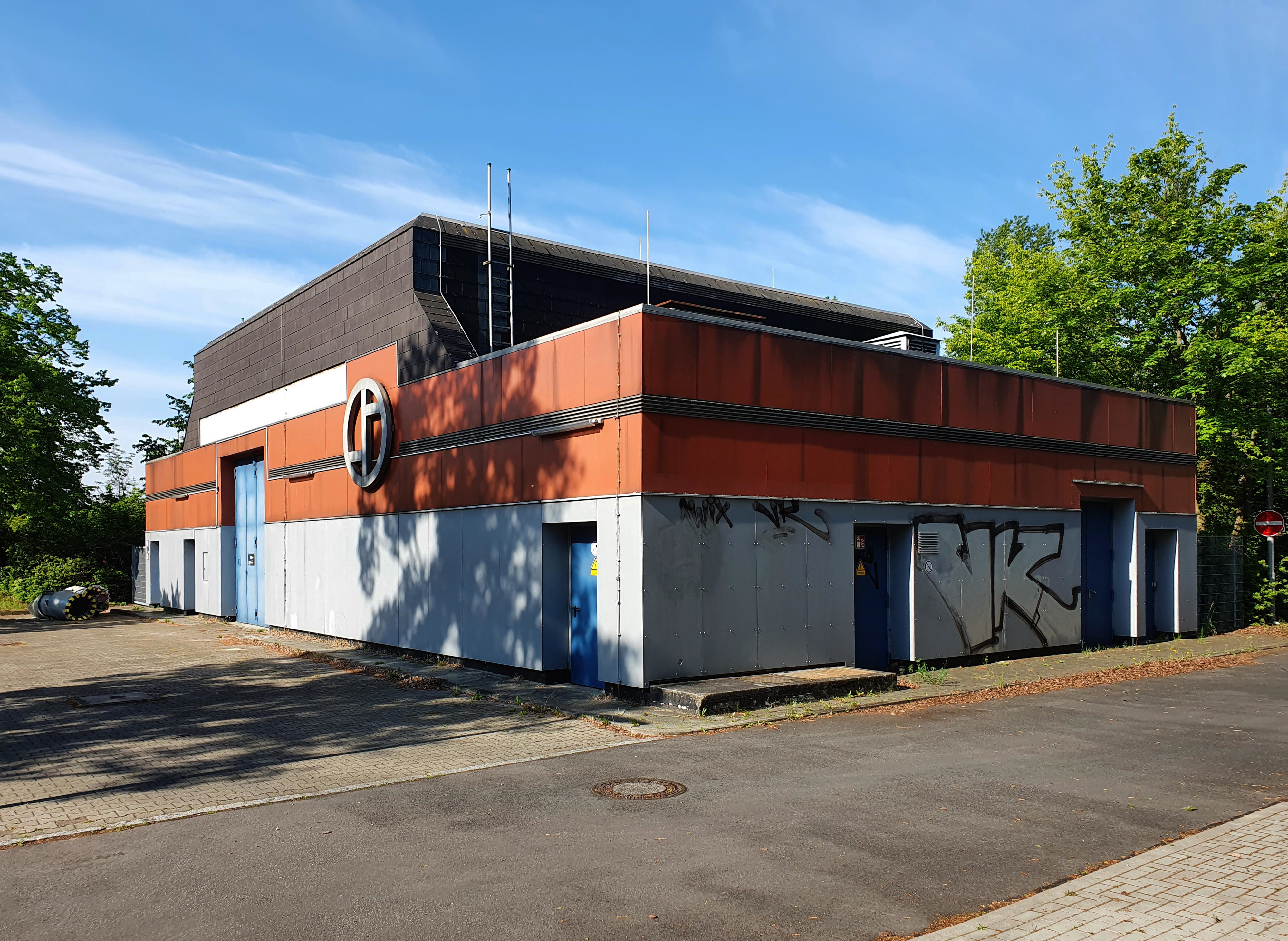 Gebäudeansicht der Tunnelleitzentrale Berlin